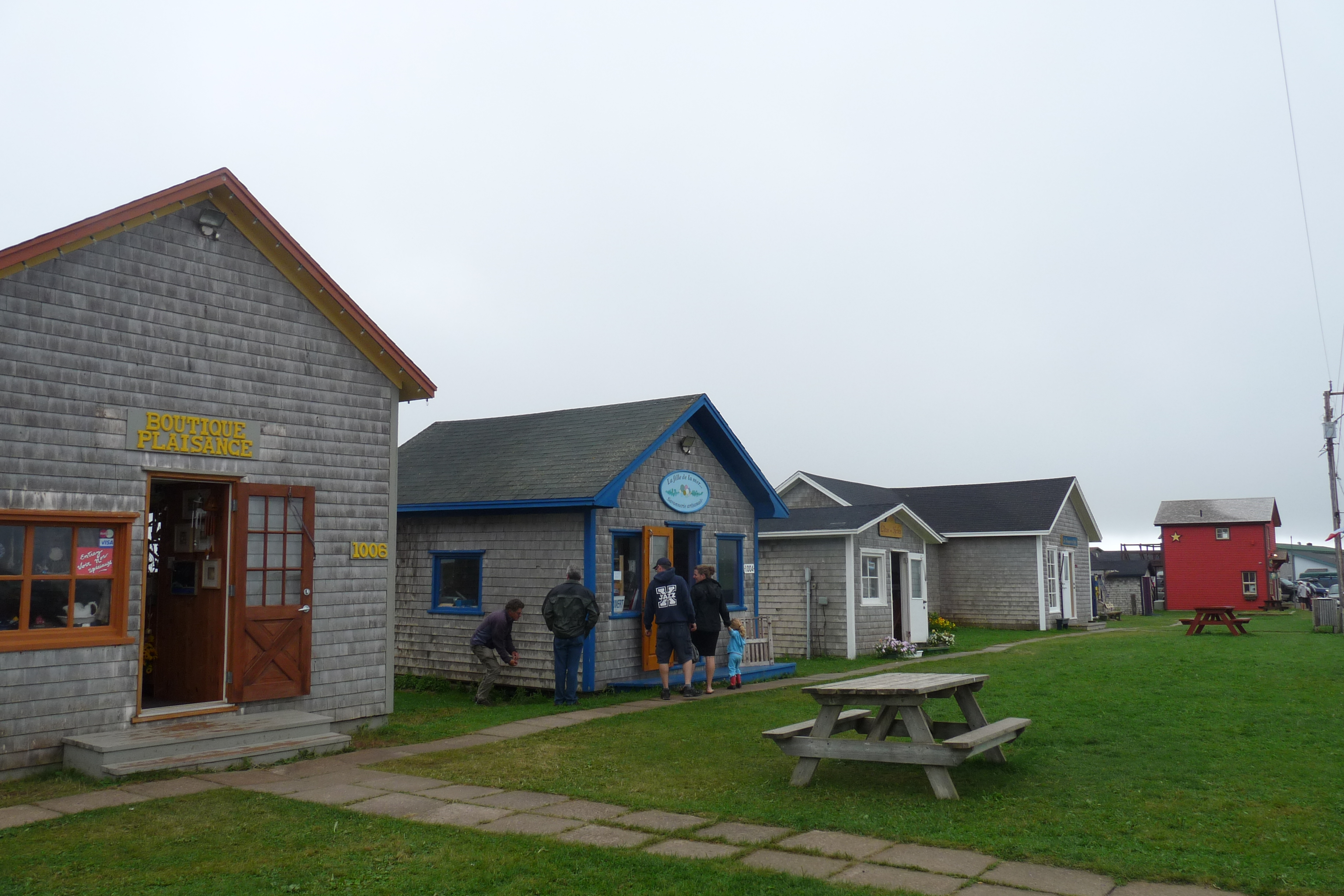 Commerces sur le Site historique de La Grave